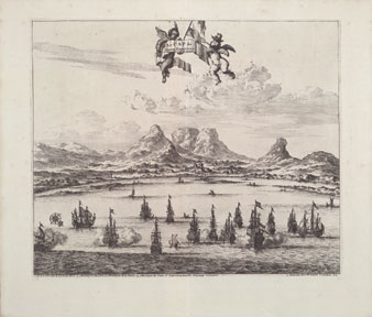 Cape of Good HopeLe Cap de Bonne Espérance comme il a été ci-devant